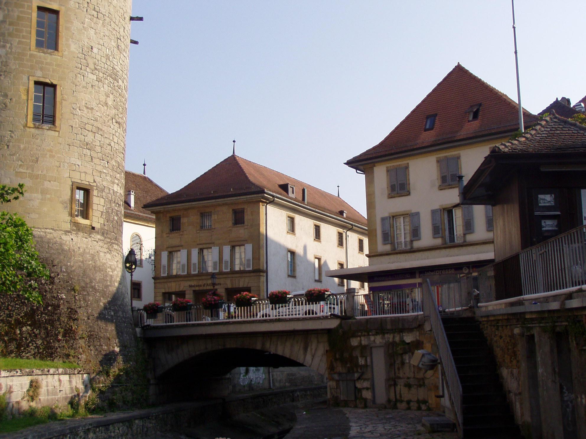 Yverdon-les-Bains